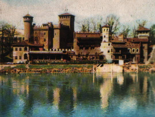 Parco del Valentino e Borgo medievale, a Torino (Italy), lungo la riva del fiume Po